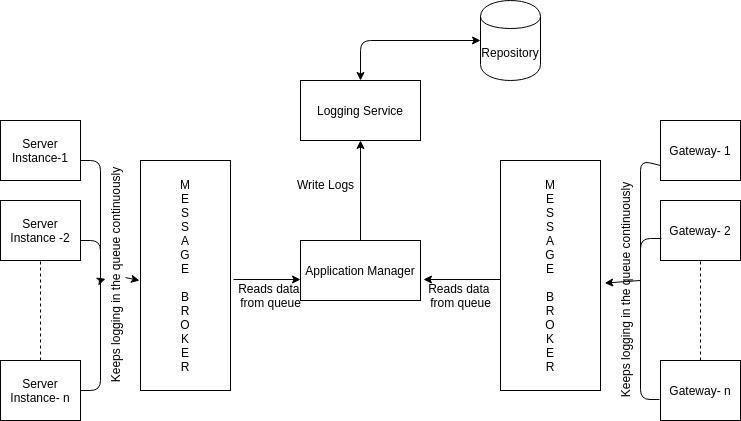 लॉगिंग सर्विस आर्किटेक्चर